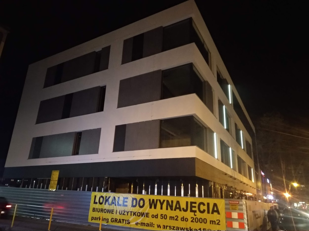 Nowy_budynek_Warszawska_15_11032020